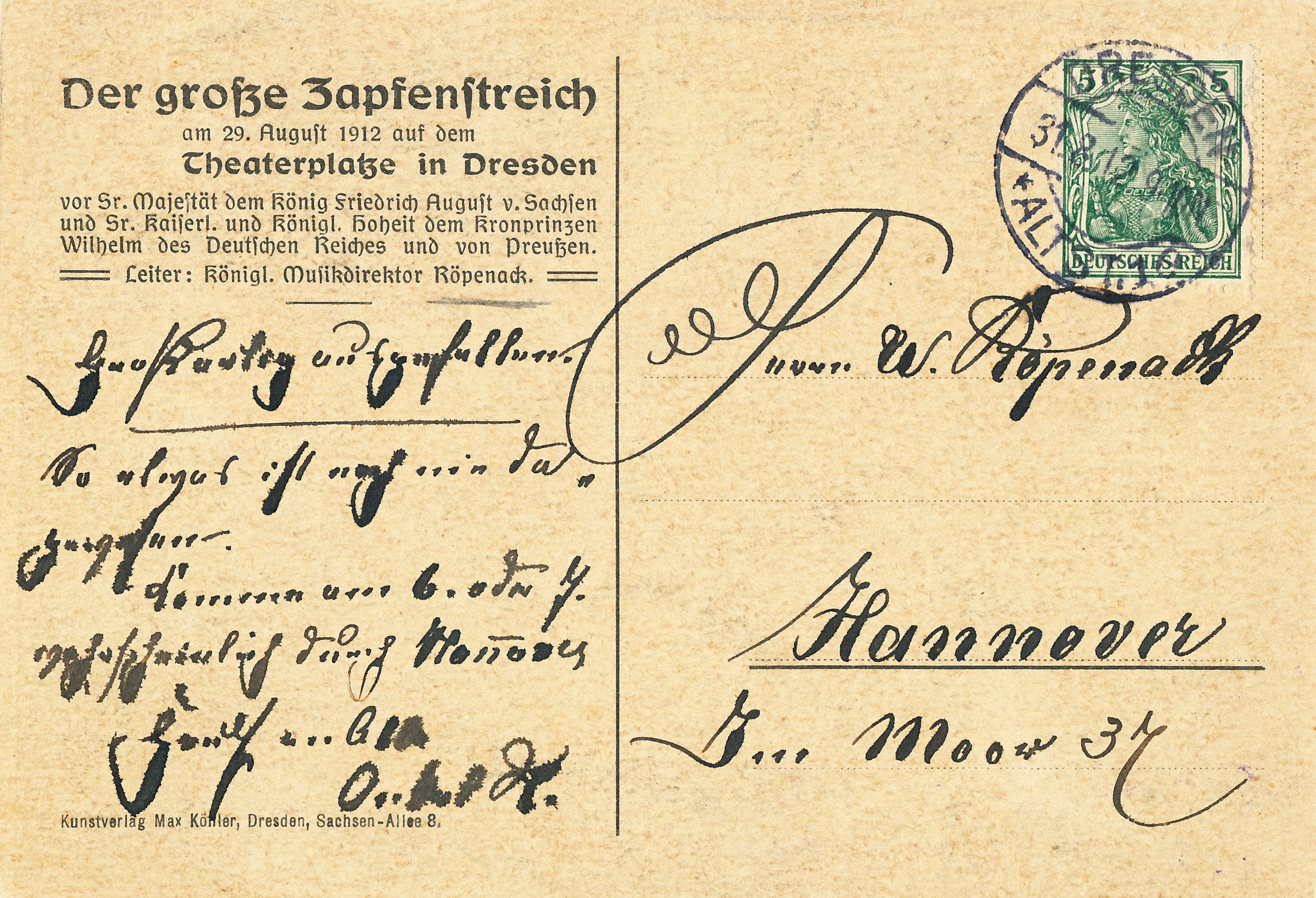 Der große Zapfenstreich am 29. August 1912 auf dem Theaterplatz in Dresden, Heinrich Christoph Röpenack